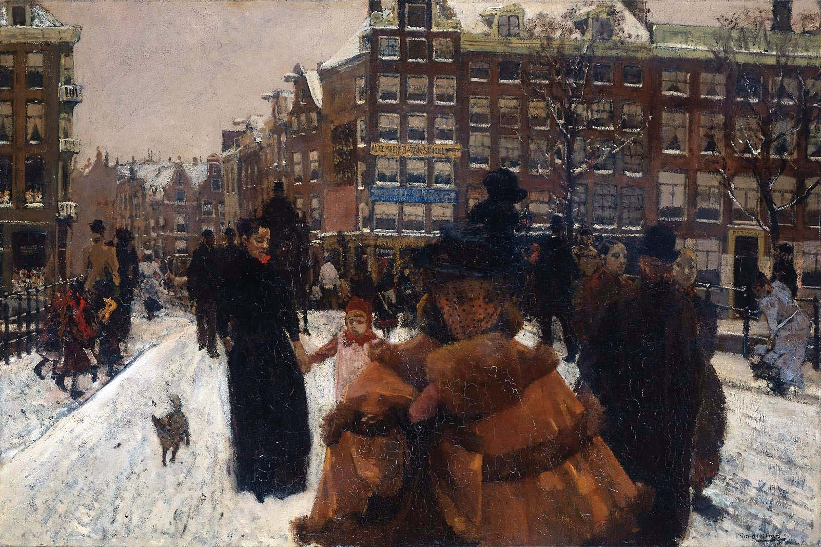 Georg Hendrik Breitner (1857 – 1923): Singelbrücke bei der Paleisstraat in Amsterdam, 1890, Amsterdam